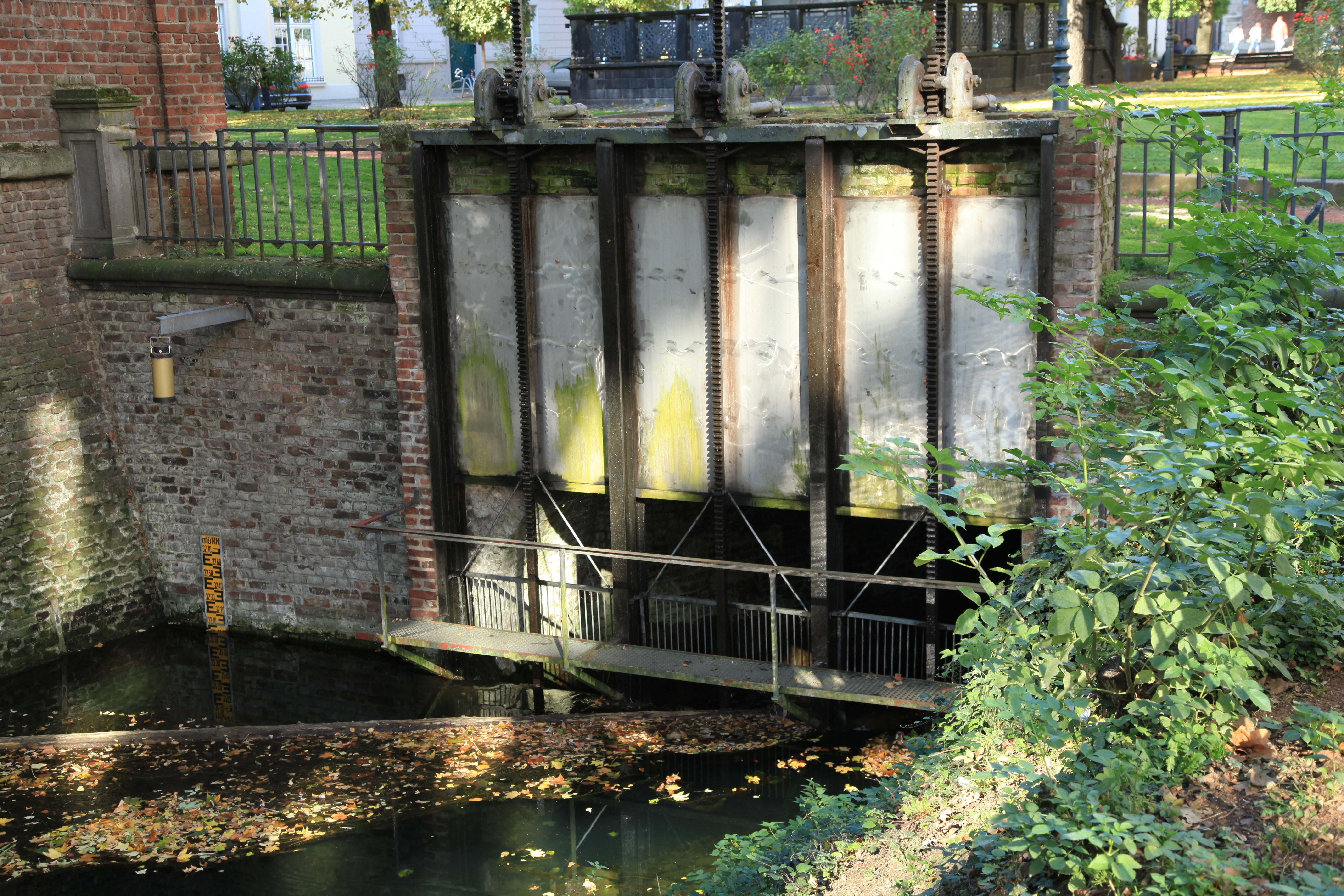 Spee'scher Graben an der Poststraße in Düsseldorf